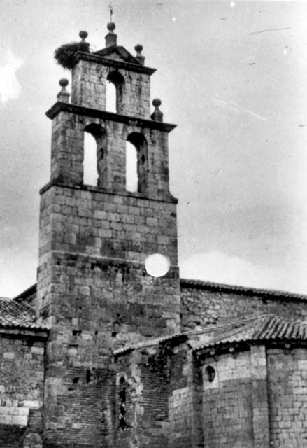 Monasterio. Torre - Abadía de Retuerta (Valladolid) - Cuaderno. Álbum de Valladolid - Fotografía 42 x 60 B/N